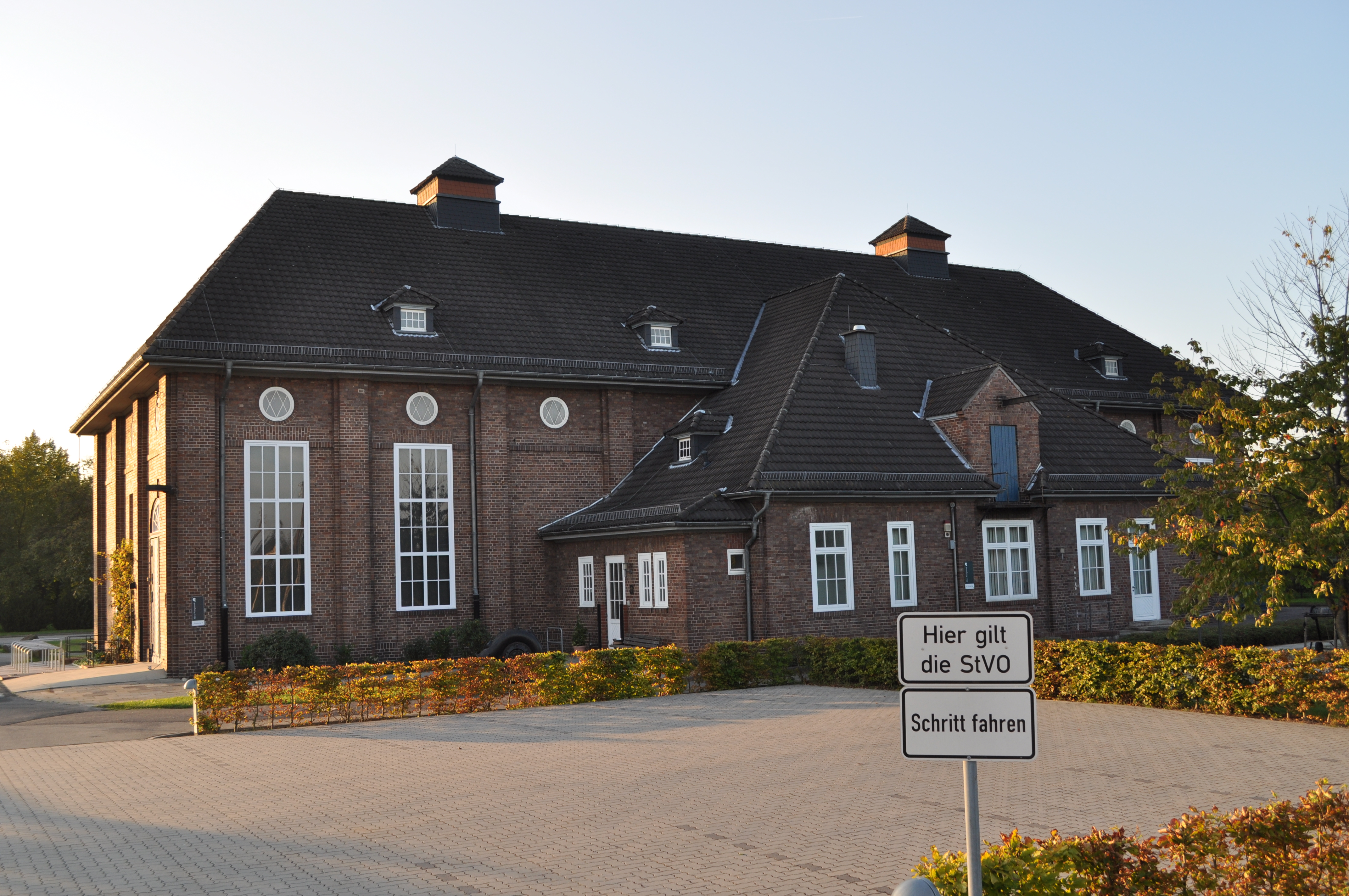 Hauptpumpwerk I, Maschinenhaus in Bremen, Bayernstraße 129.Das abgebildete Objekt ist ein geschütztes Kulturdenkmal in der Freien Hansestadt Bremen, mit der Nr. 0423 beim Landesamt für Denkmalpflege registriert.